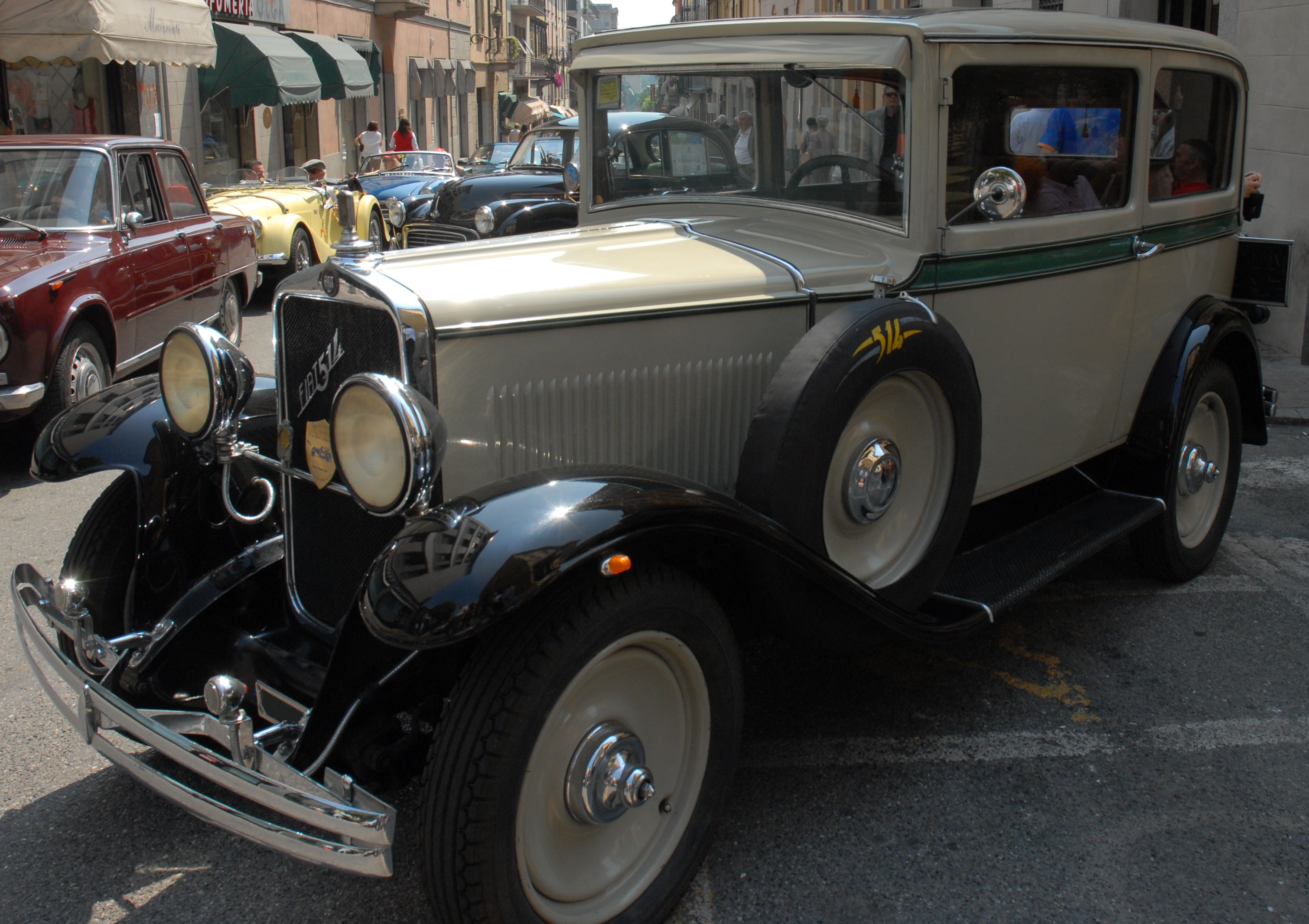 Fiat 514 at 2° Raduno Auto Storiche Città di Stradella, 22 June 2008.